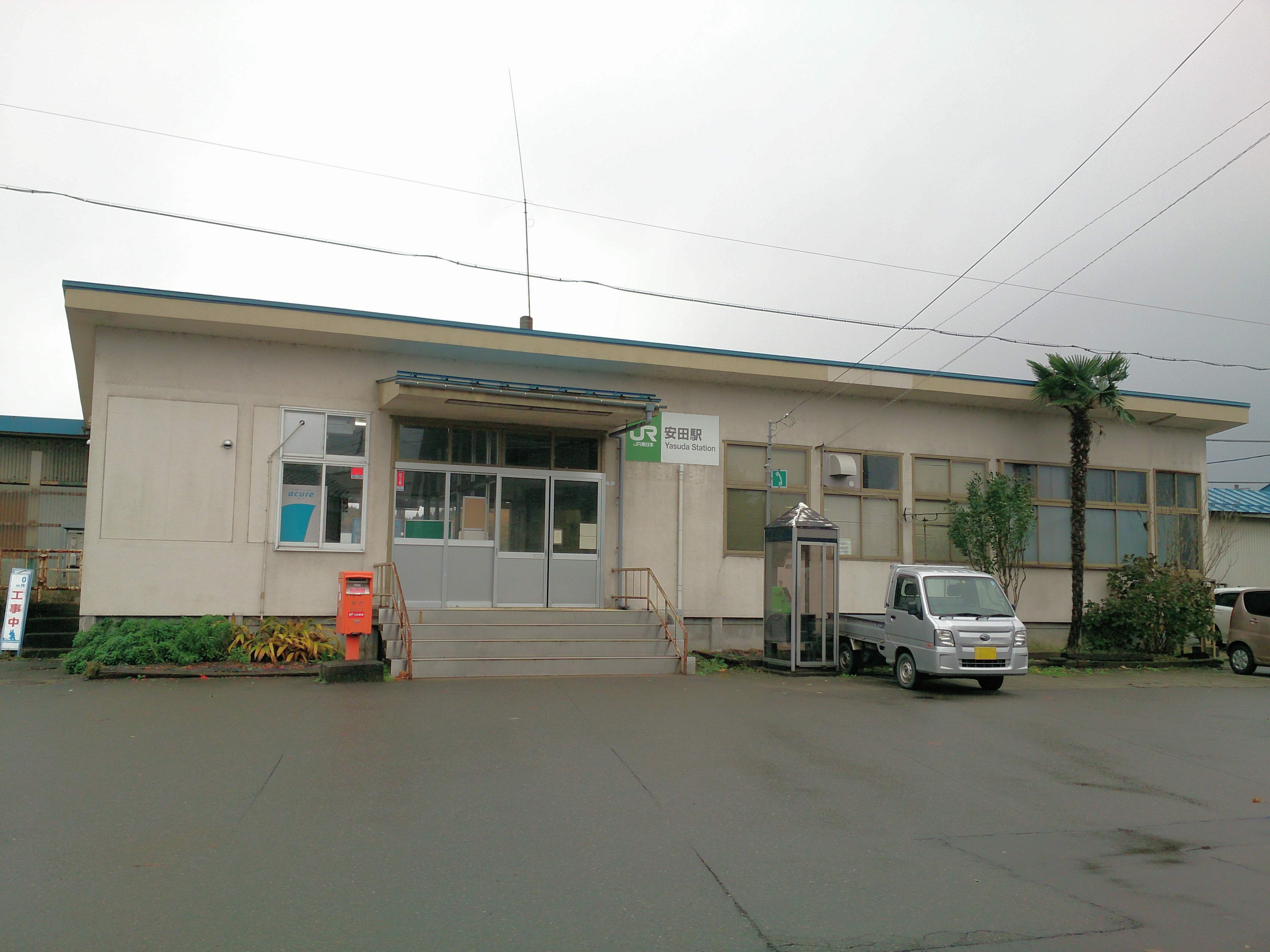 新潟県の安田駅、駅名表示交換後